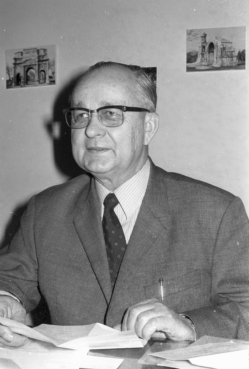 Direktor des Instituts für Ur- und Frühgeschichte der Christian-Albrechts-Universität (CAU).